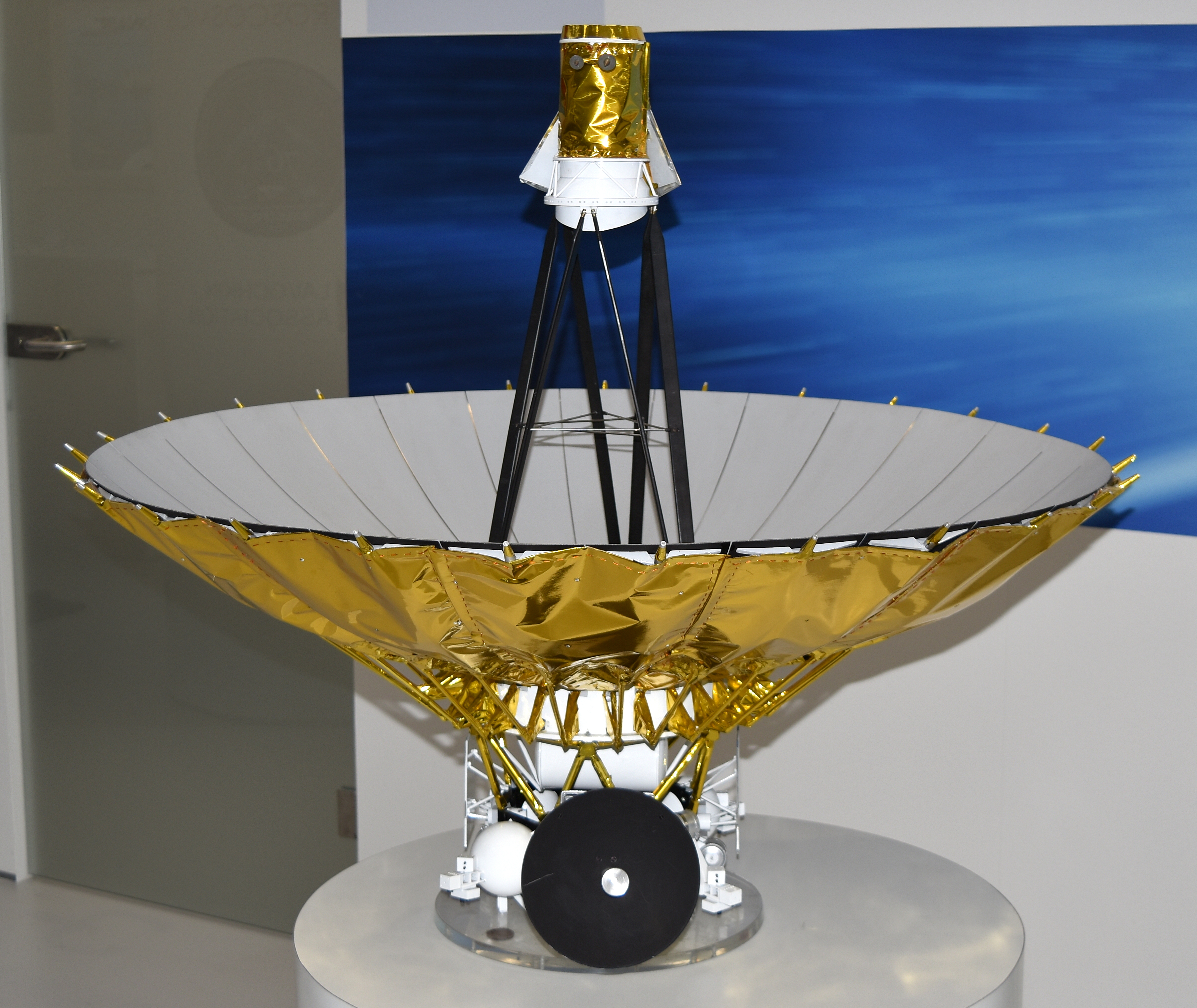 Maquette du radiotélescope spatial russe RadioAstron (Spektr-R), Salon du Bourget 2015